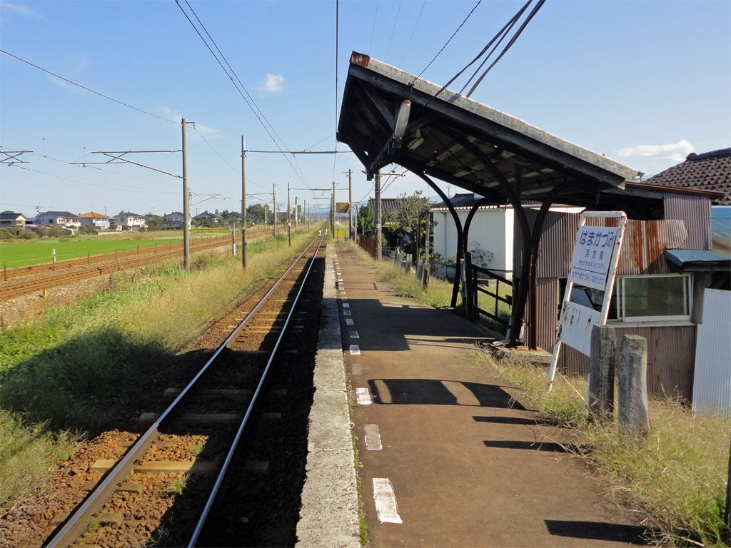 富山地方鉄道本線浜加積駅ホーム